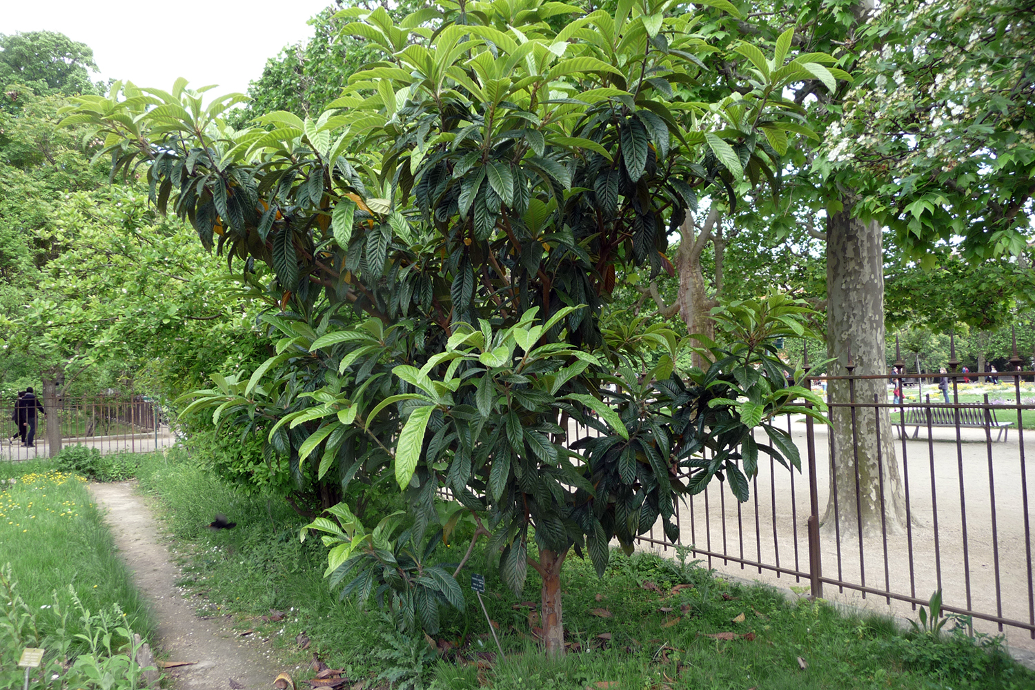 Eriobotrya japonica